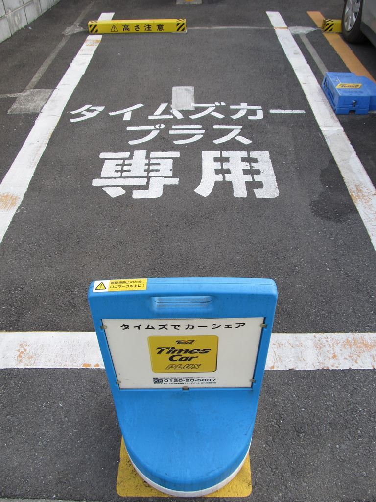 タイムズカープラス車両貸出状態